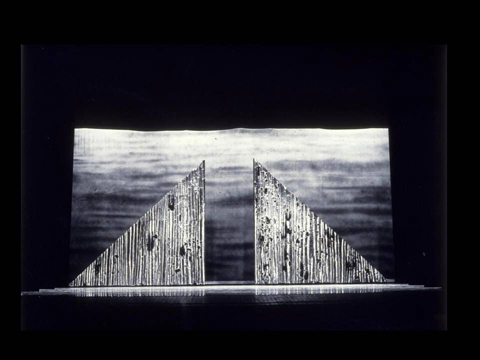 טלטלה